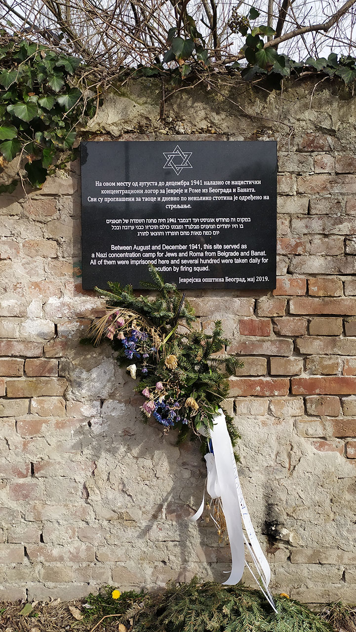 Нова спомен плоча код Топовских шупа